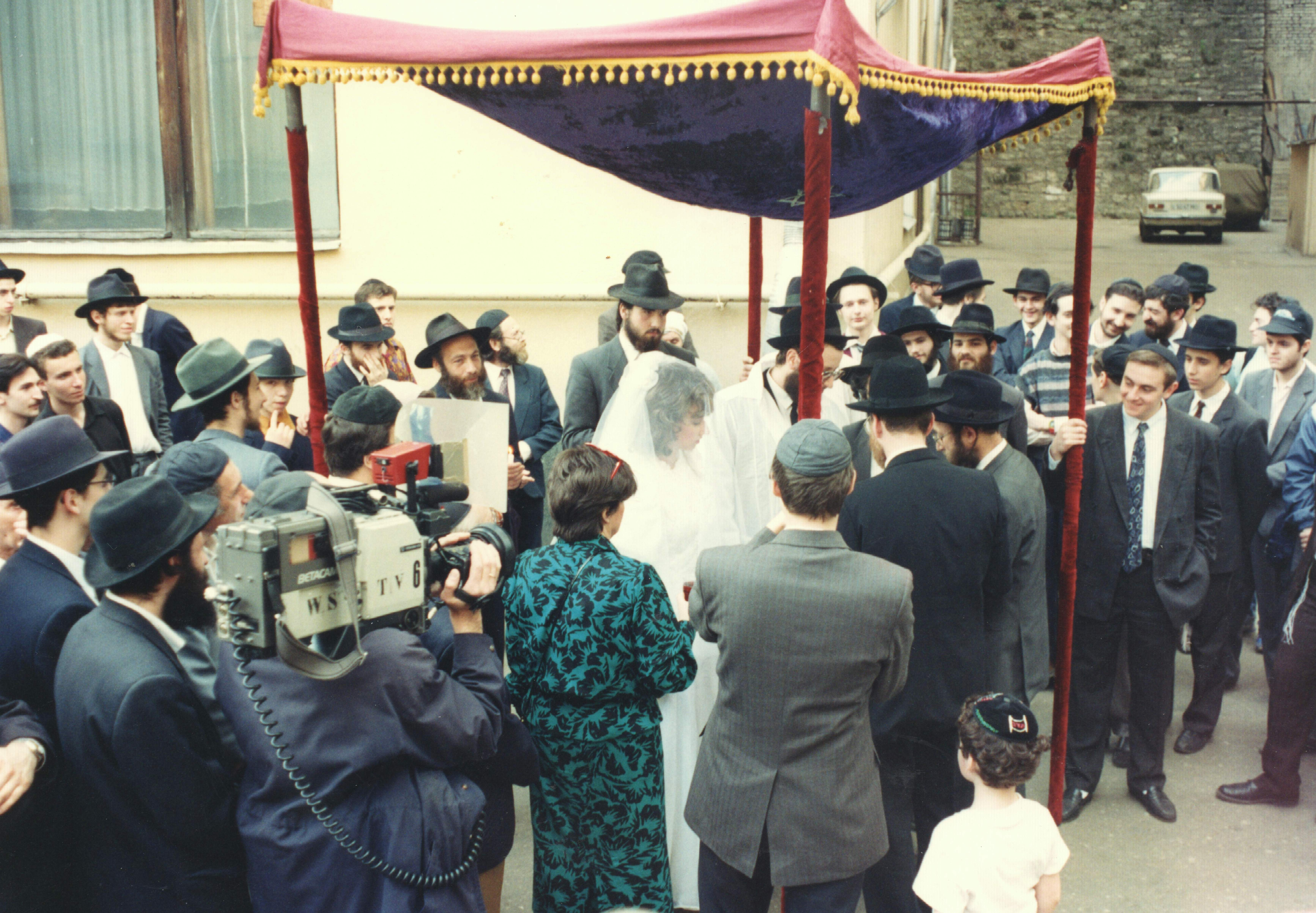 jewish wedding